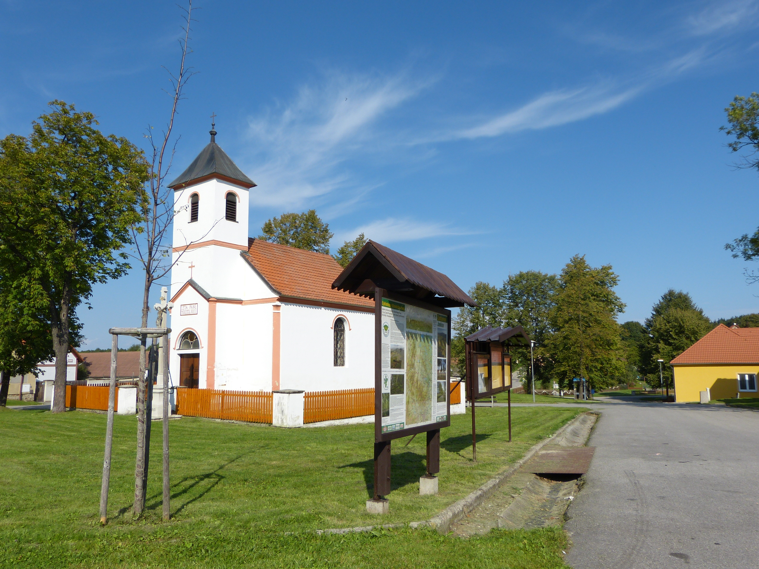 Kaplička, náves, Jankov (okres České Budějovice).